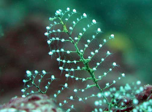 Pennaria disticha, en el Parque Nacional de Samoa Americana